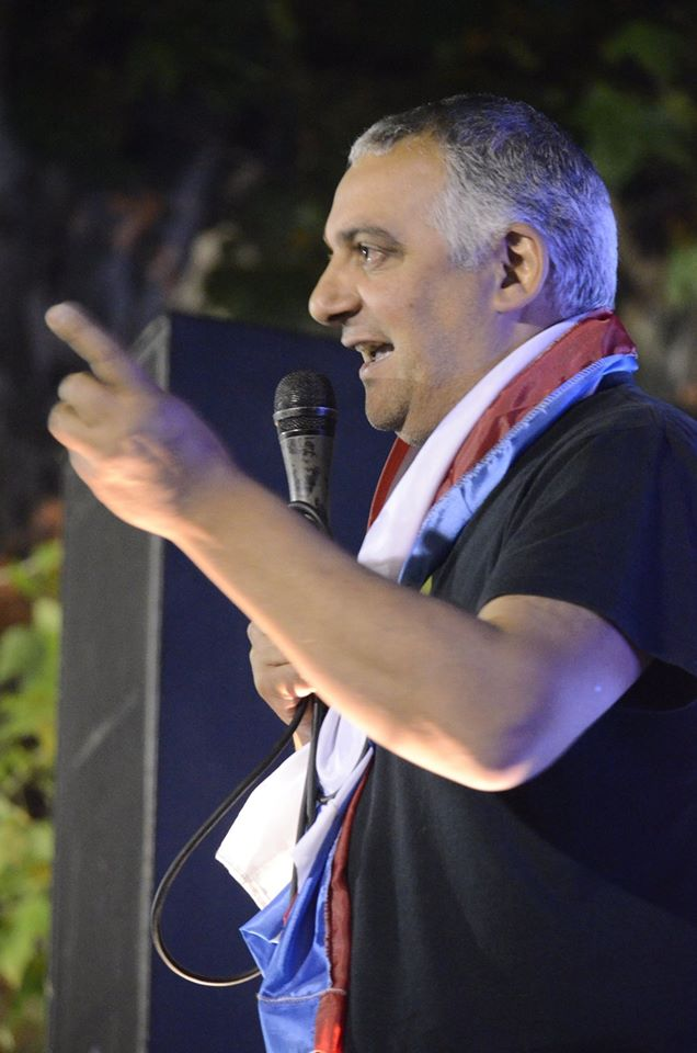 Imagen Martin TIerno